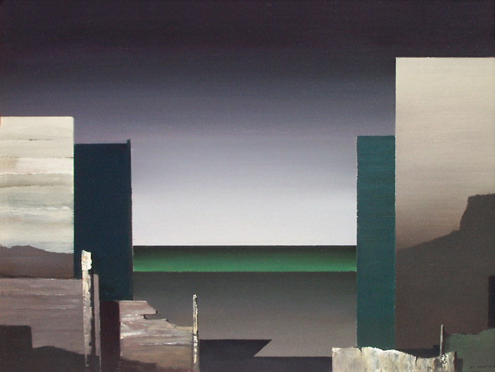 Benedek Jenő, ifj. (Csongrád, 1939. június 13.– 2019. augusztus 20.) festőművész alkotása: Csend, 1979, olajfestmény, 60x80 cm